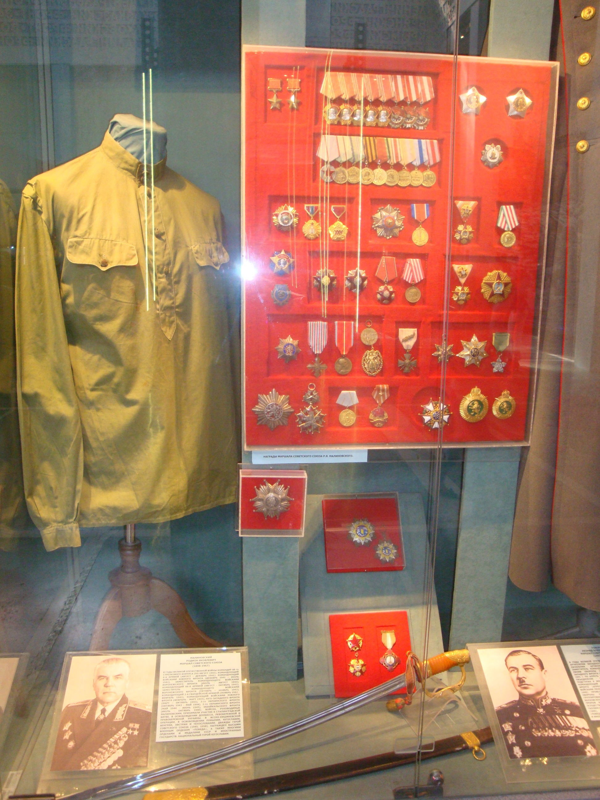 гимнастёрка и награды маршала Малиновского